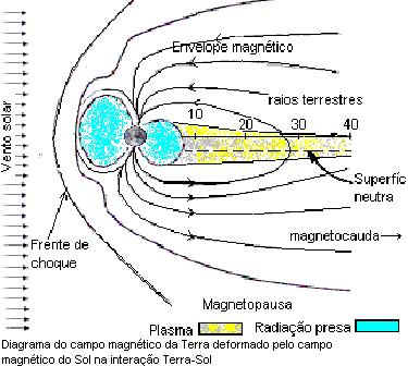 Diagrama do campo magnético da Terra deformado pelo campo magnético do Sol na interação Terra-Sol - Uma vez que explosões solares ocorrem ciclicamente, na Terra, as tempestades magnéticas seguem o mesmo ciclo. Efeito este, devida conexão do campo magnético do Sol com o campo magnético da Terra. A conexão magnética direta não é o estado normal do ambiente espacial, porém quando partículas altamente energéticas se propagam ao longo das linhas magnéticas, podem ser incorporadas à magnetosfera terrestre, gerar correntes, estando assim a fazer o campo magnético submeter-se à variação dependente do tempo. O Campo magnético e sua deformação ocasionada pela interação Sol-Terra juntamente à irradiação do campo magnético do Sol está assim a ser representada.